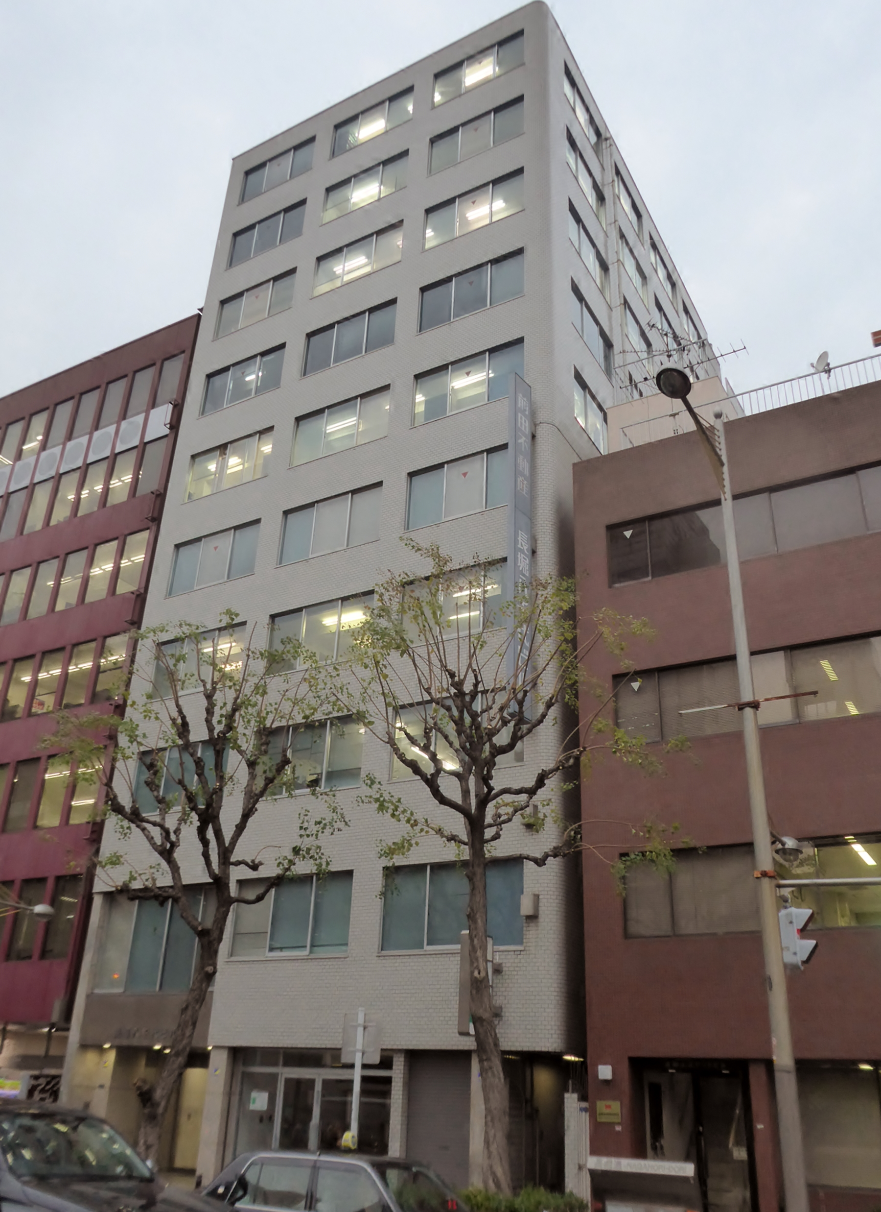 長堀八千代ビルを撮影。